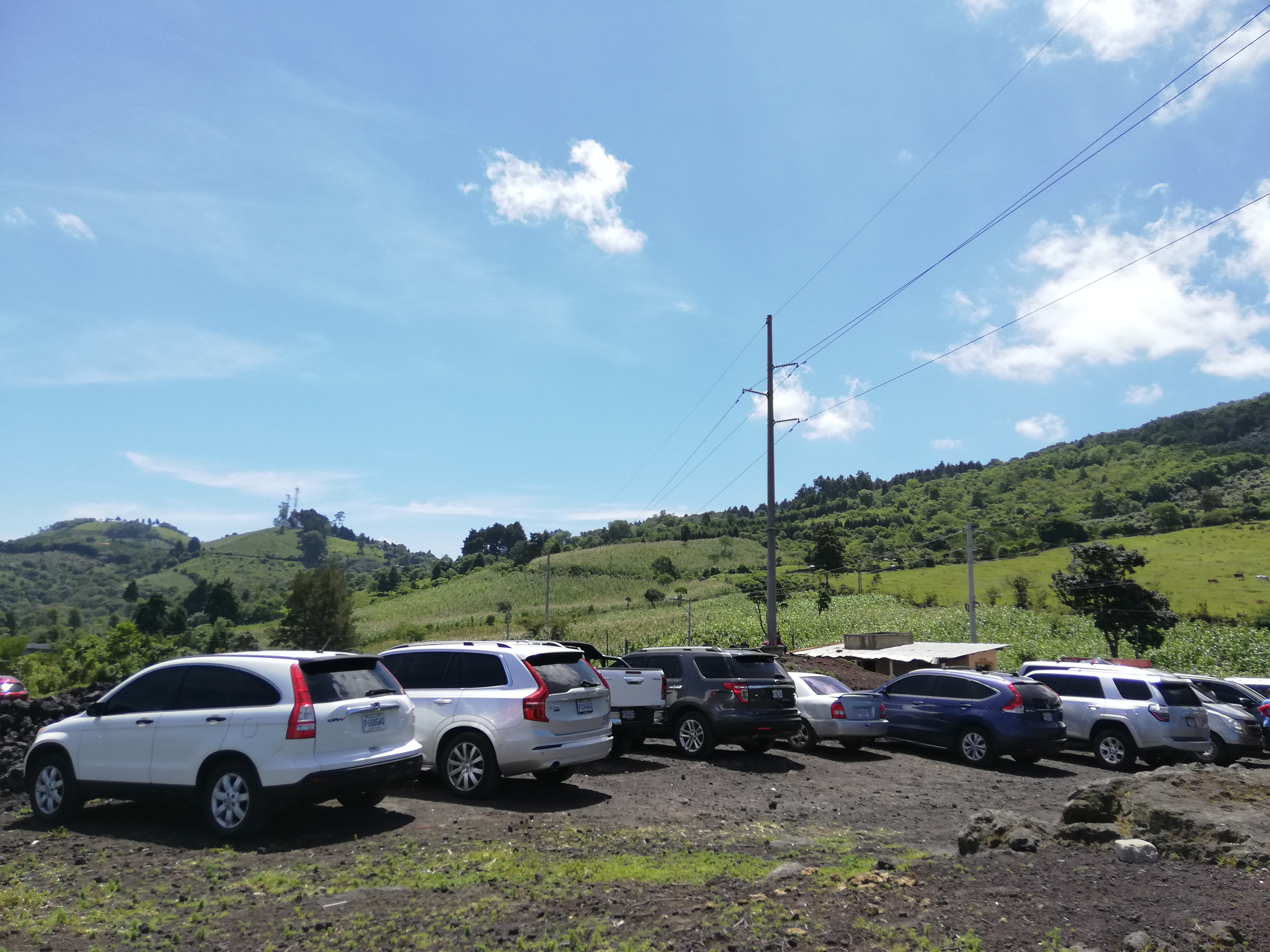 Parqueo en el Parque Nacional Volcán de Pacaya, Guatemala